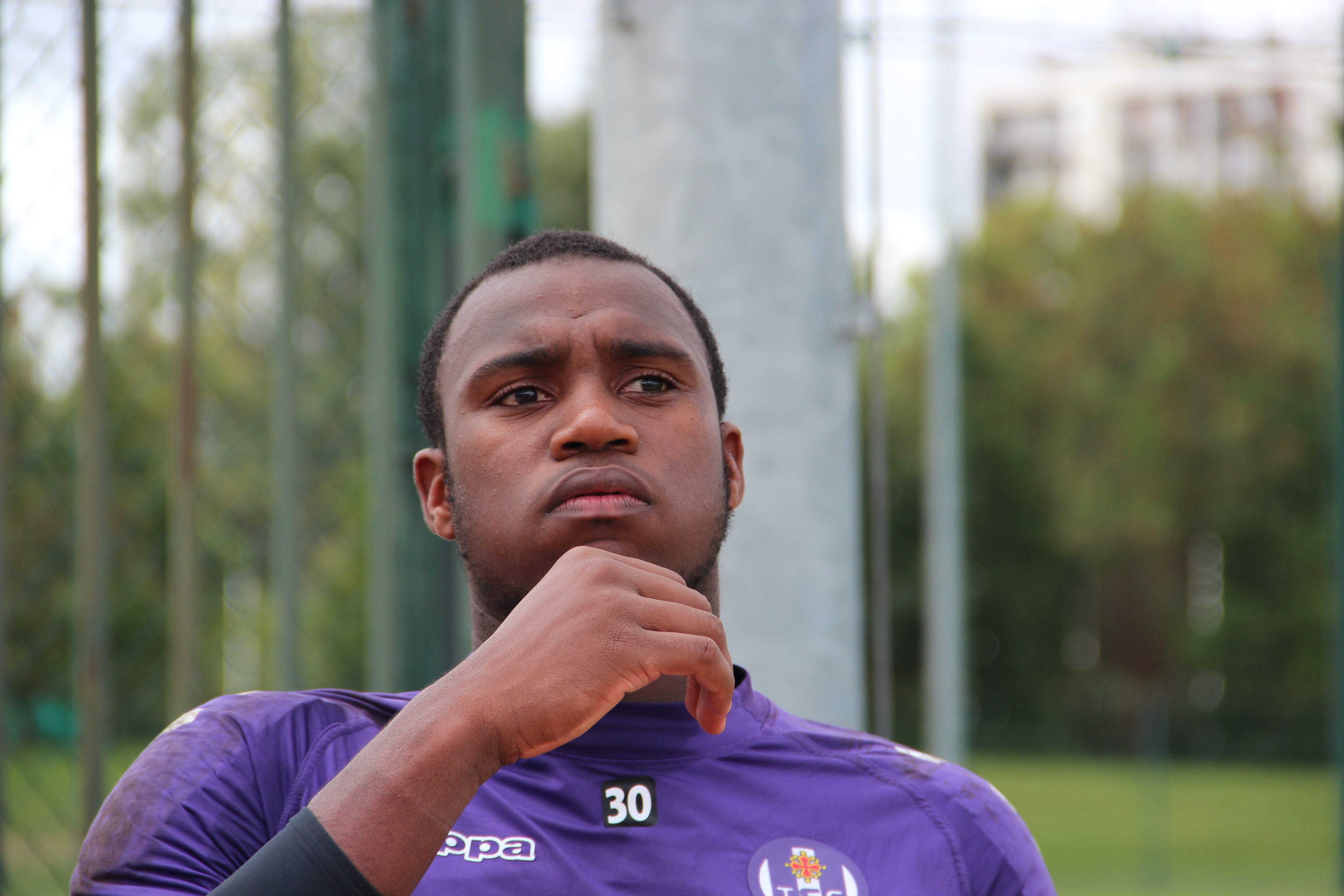 Entraînement du Toulouse Football Club, le 12 septembre 2012. Ali Ahamada, gardien.